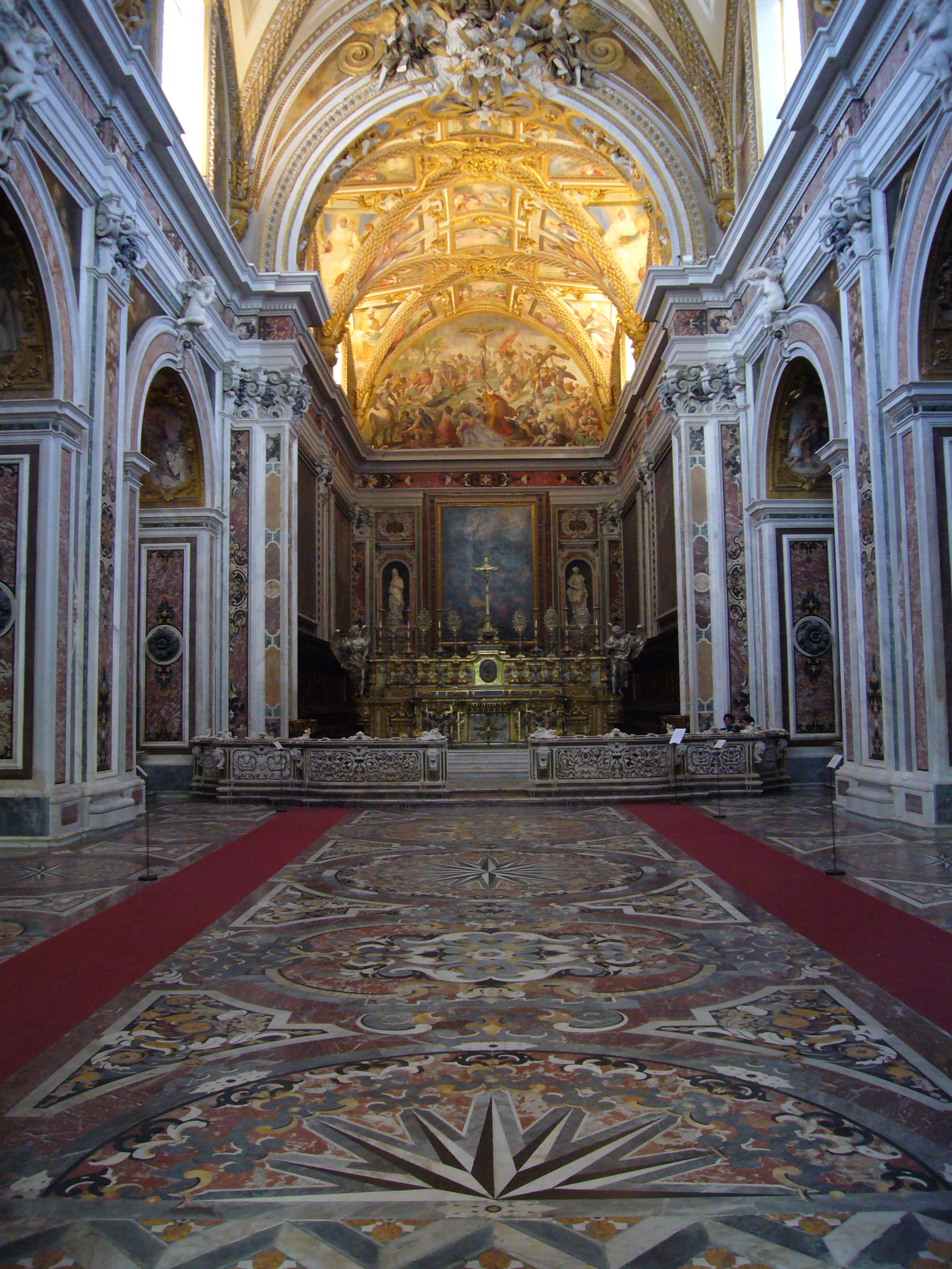 Napoli, Certosa di san Martino: la chiesa